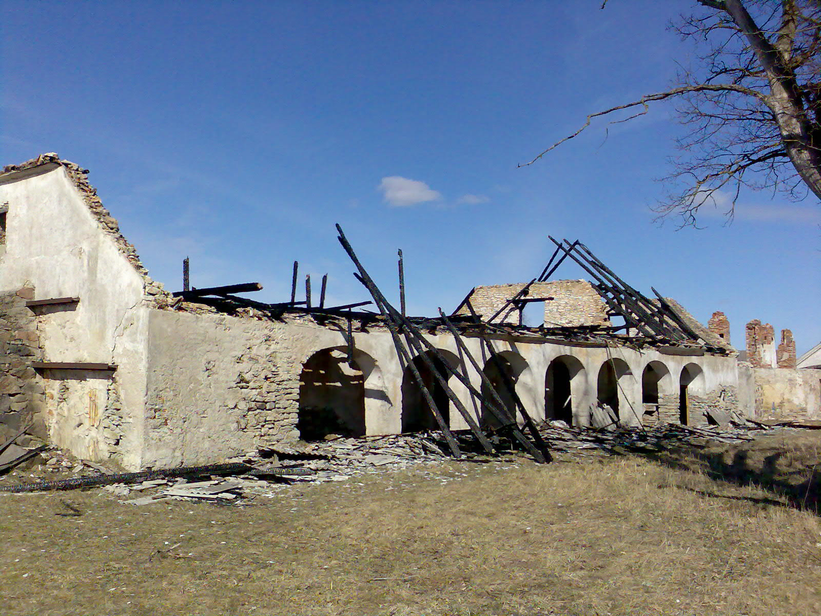 Putkasten kartanon aittarakennus. 1800-luvun alku. Tuhoutui tulipalossa v. 2007. Käina, Hiidenmaa, Viro